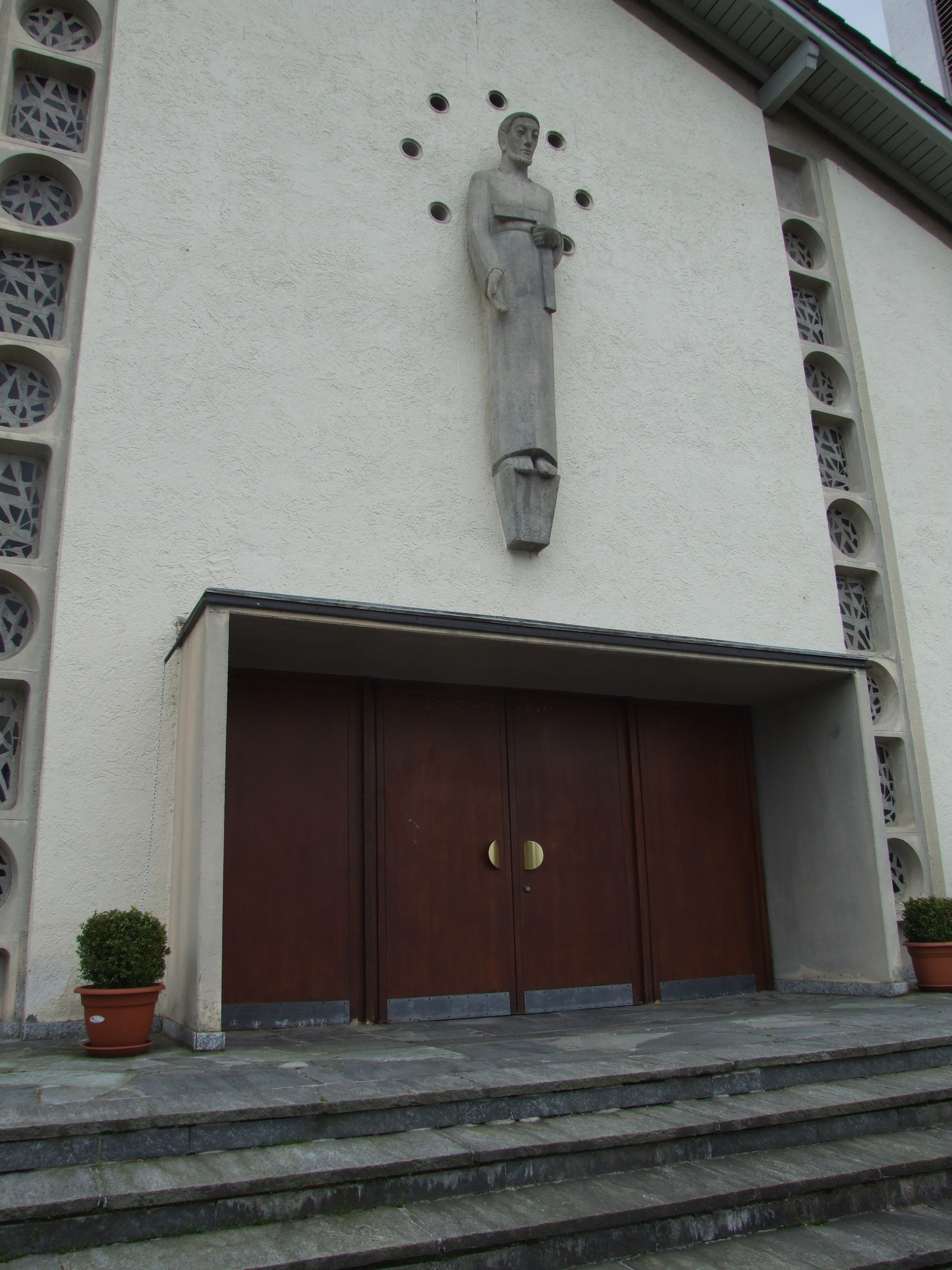 Eingangsbereich der katholischen Kirche in Eschelbronn